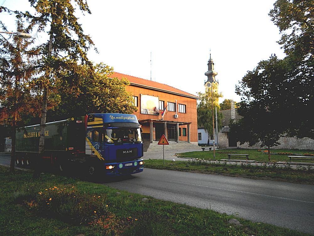 Zgrada slovačkog pozorišta u Bačkom Petrovcu